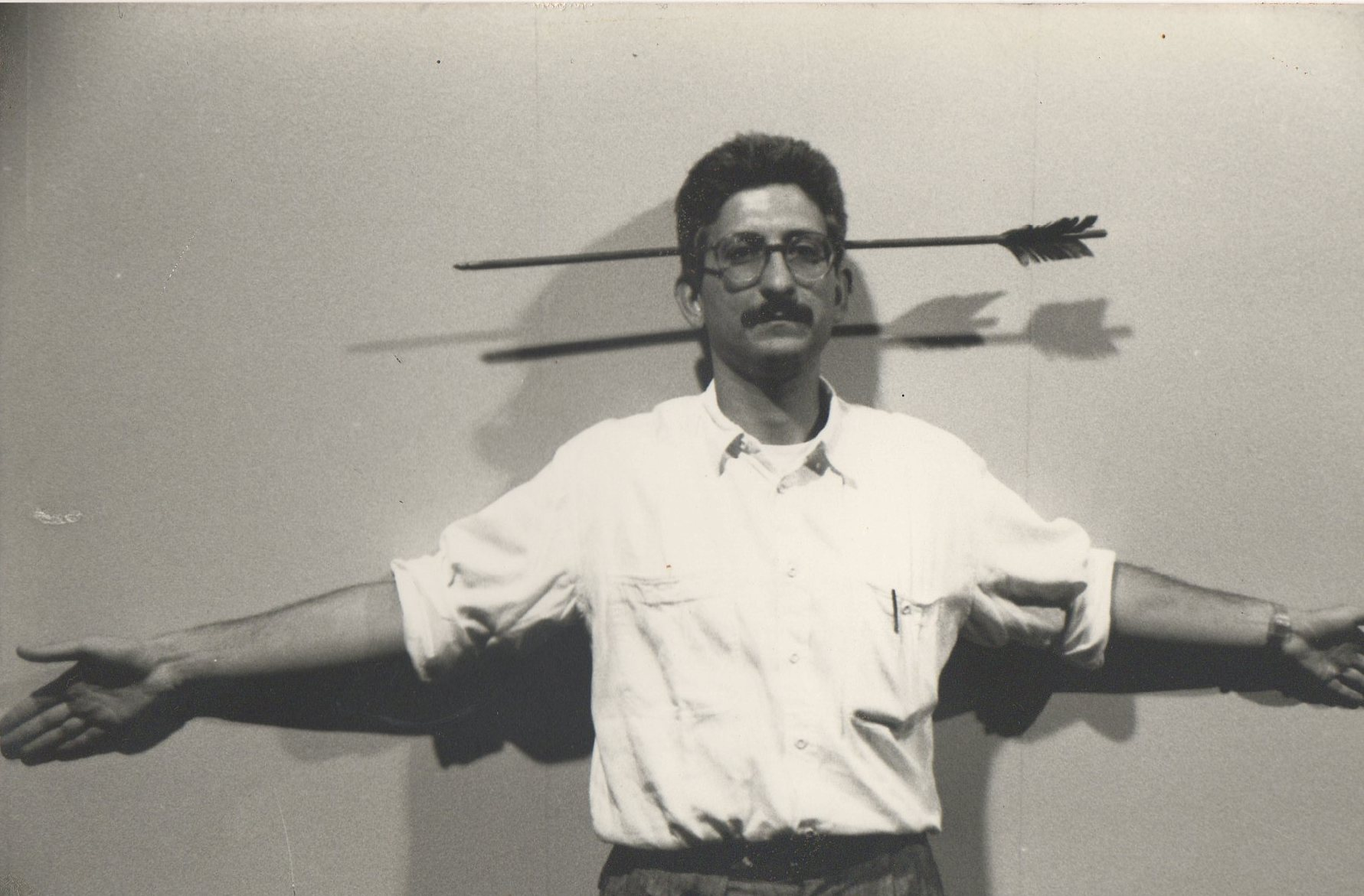 Zappalà freccia